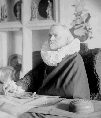 Karel Lustig (1856 - 1924), Český pedagog a muzejník - ředitel soběslavského muzea Karel Lustig jako Petr Vok.